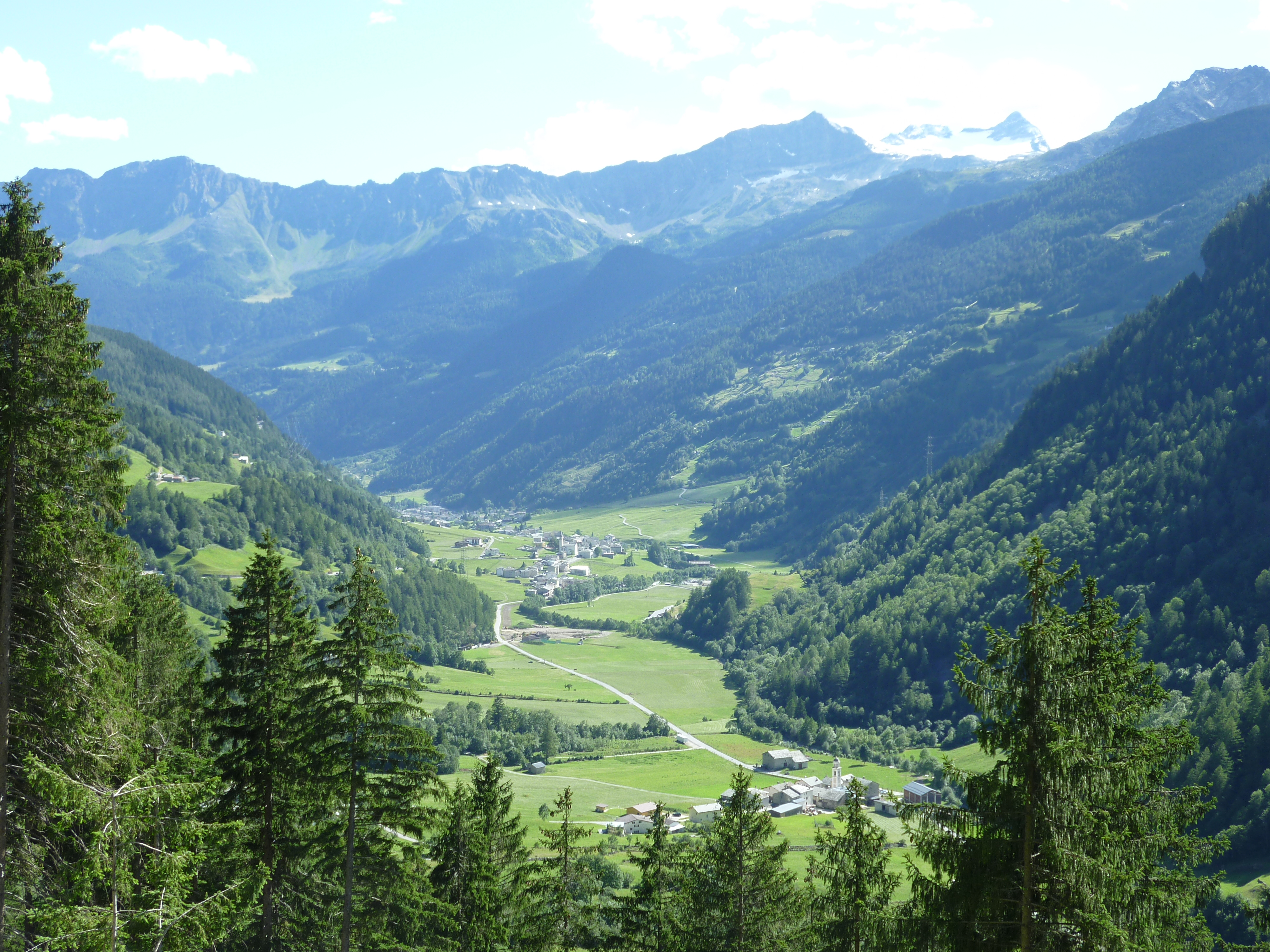 Talabschnitt bei San Carlo